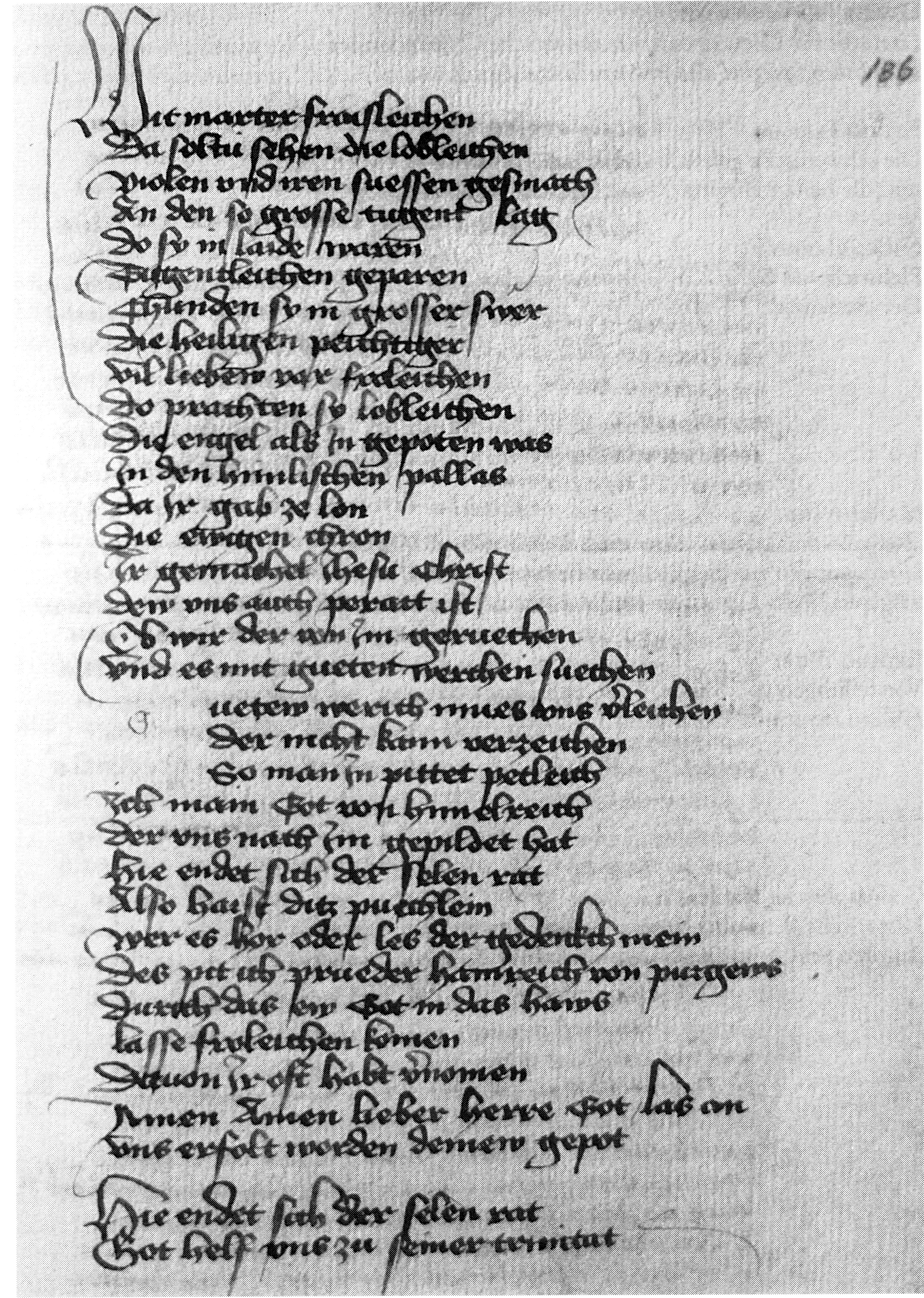 Heinrich von Burgeis: Der Seele Rat, Brixen, Priesterseminar, Cod. R 7